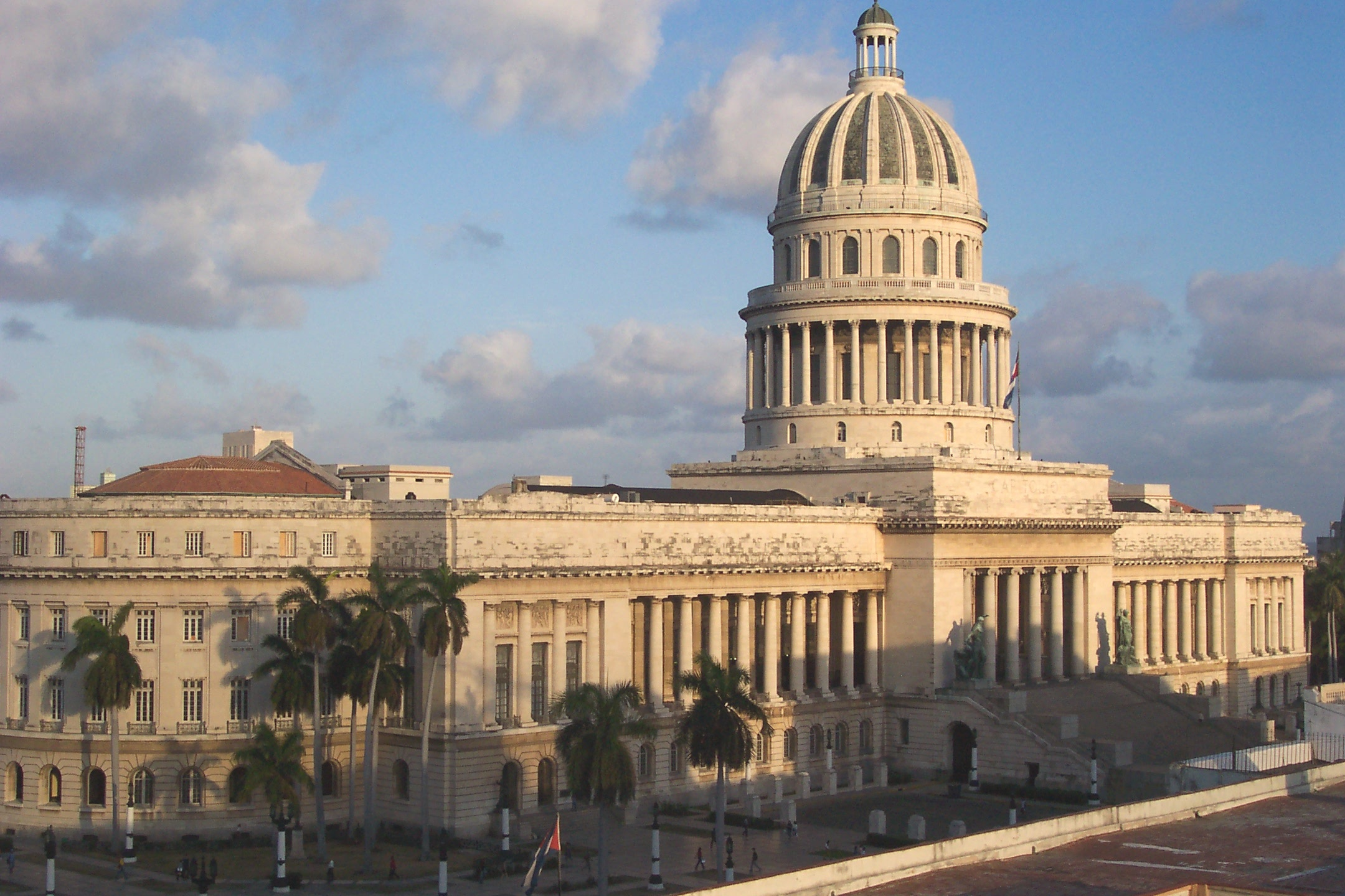 El Capitolio, La Habana